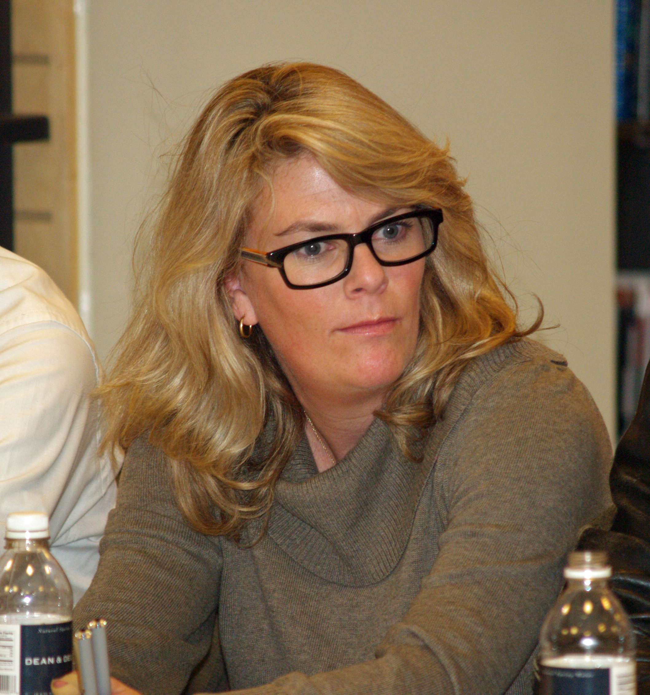 Laura Krafft by David Shankbone